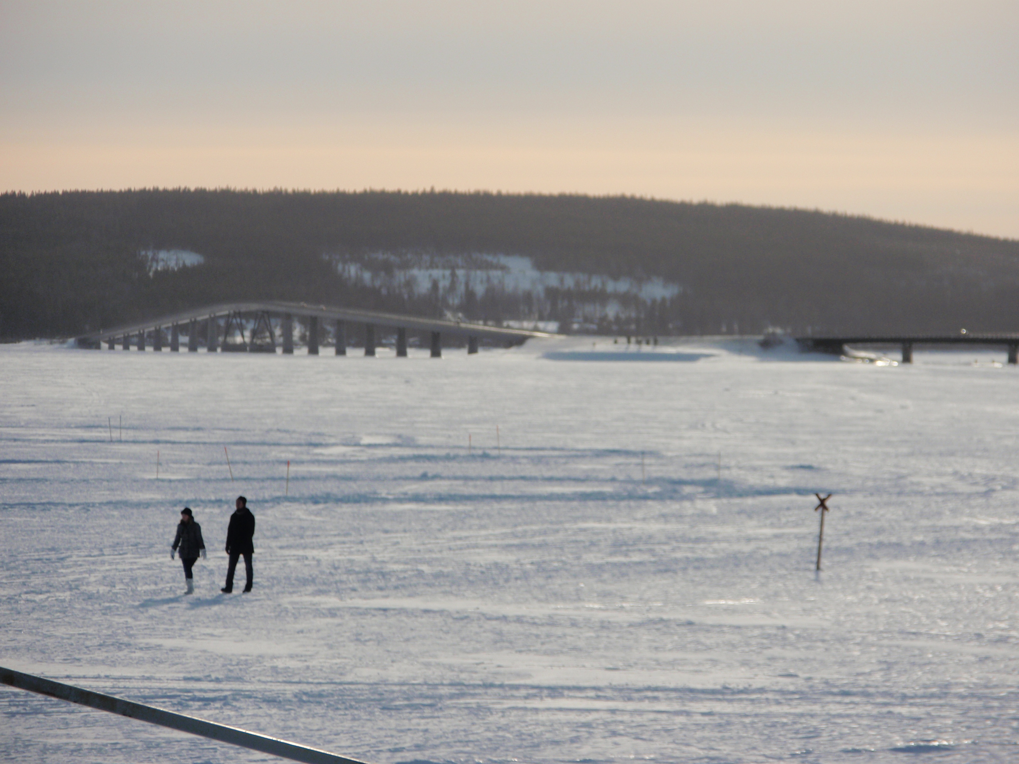 Vallsundsbron